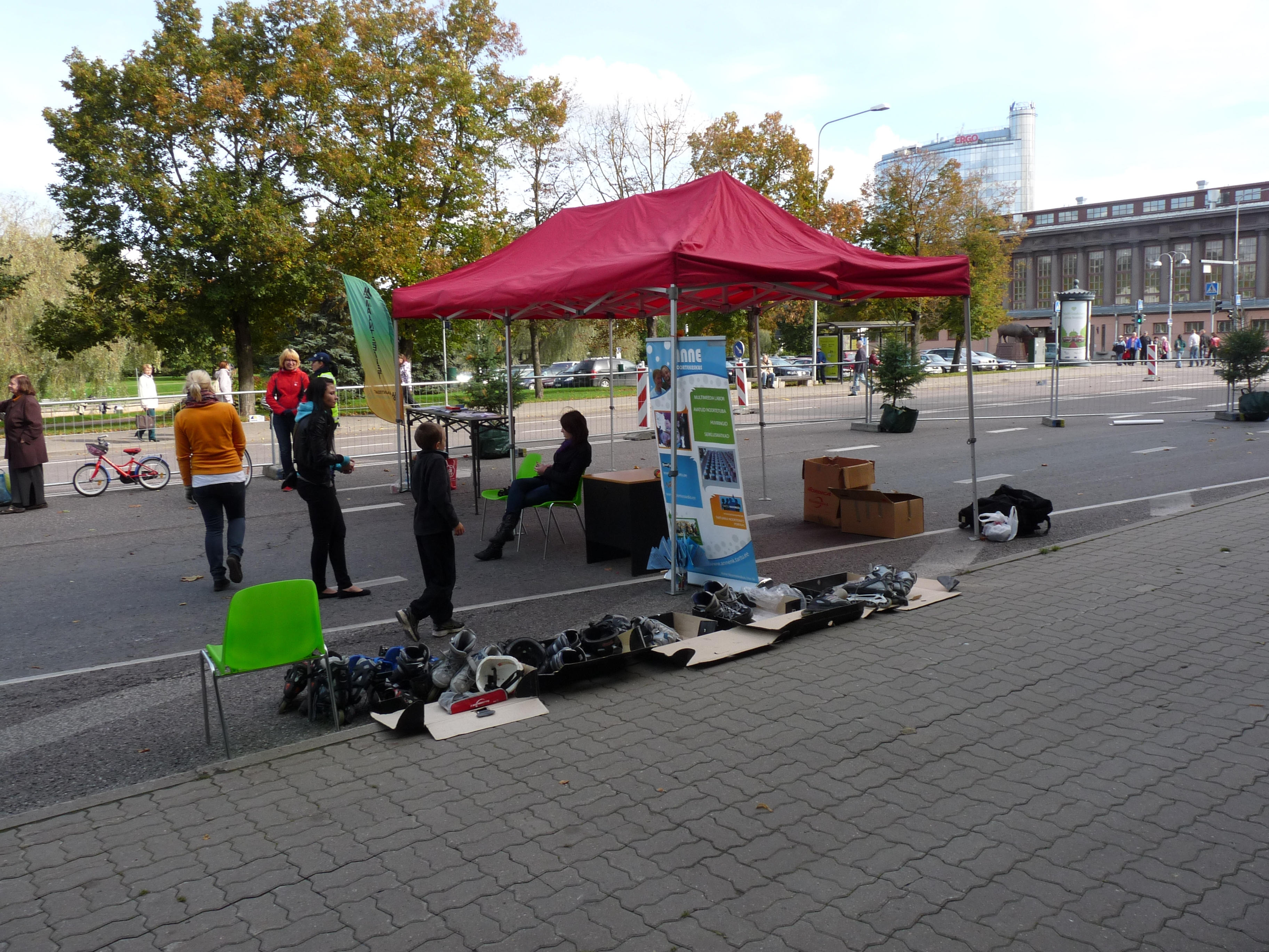 Anne noortekeskuse infotelk Vabaduse puiestee ääres Tartu linna tervisepäeval, 22. september 2012